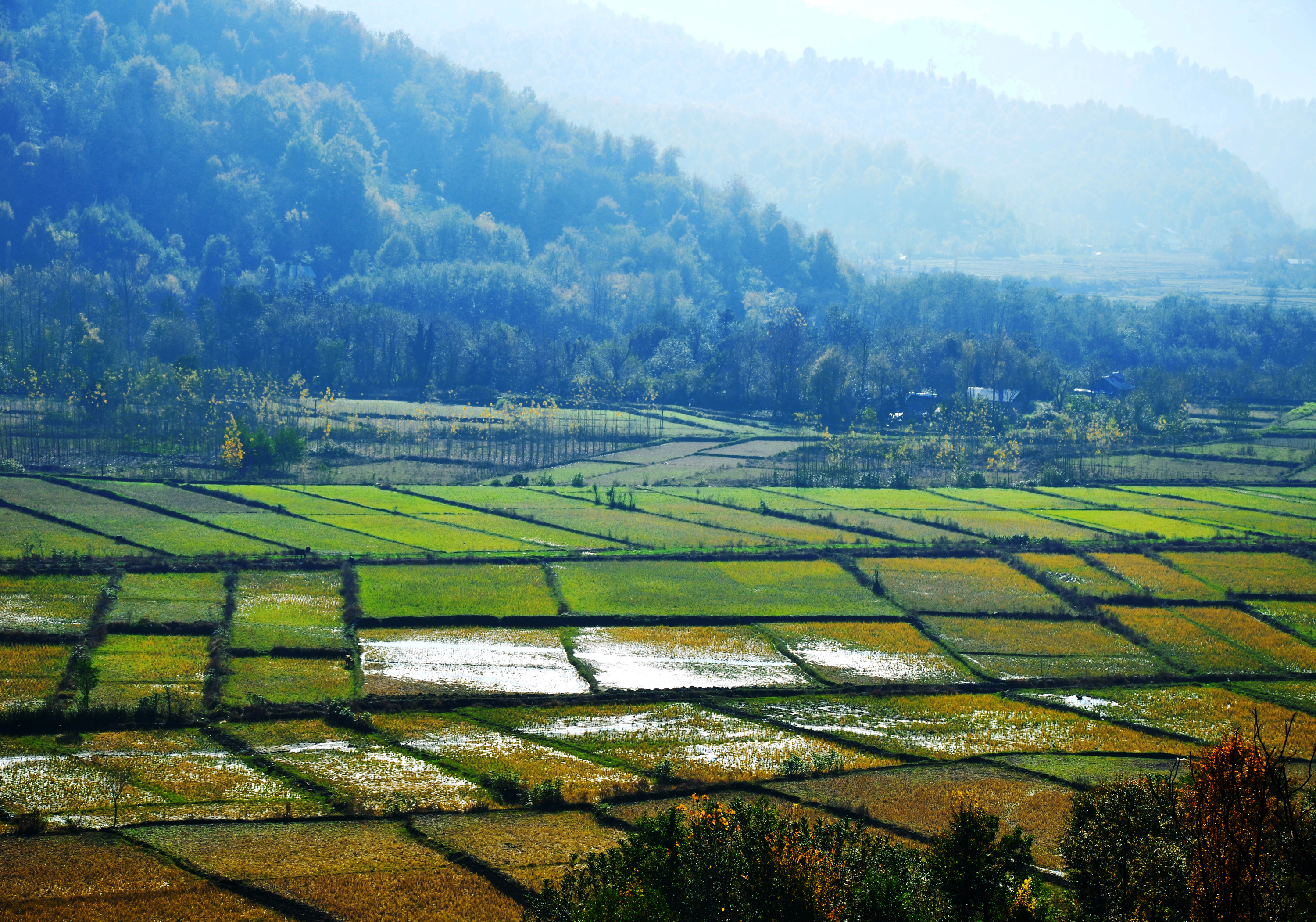 Gilan - Siyahkal